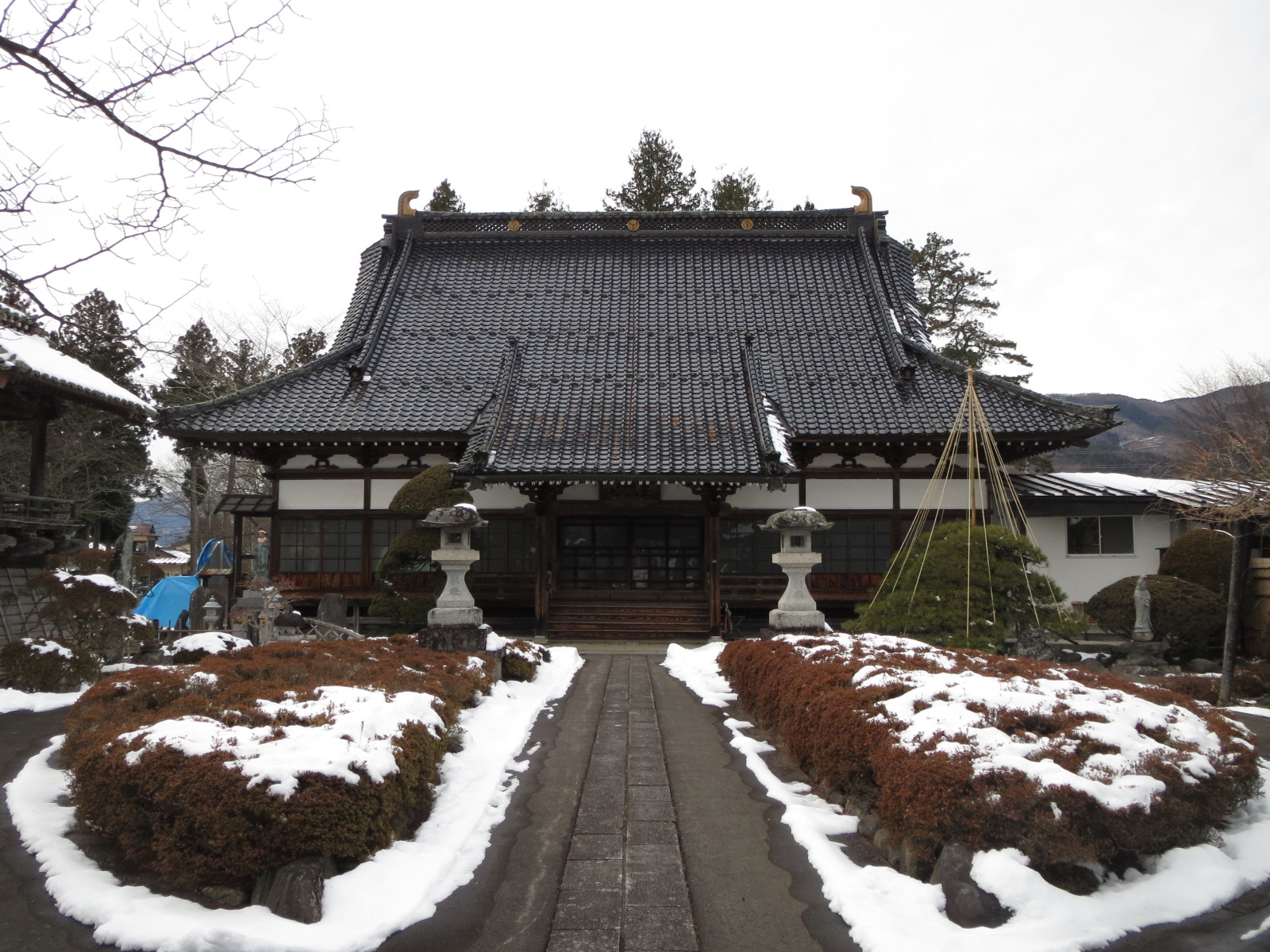 善明寺本堂（遠野市） Canon IXY 3